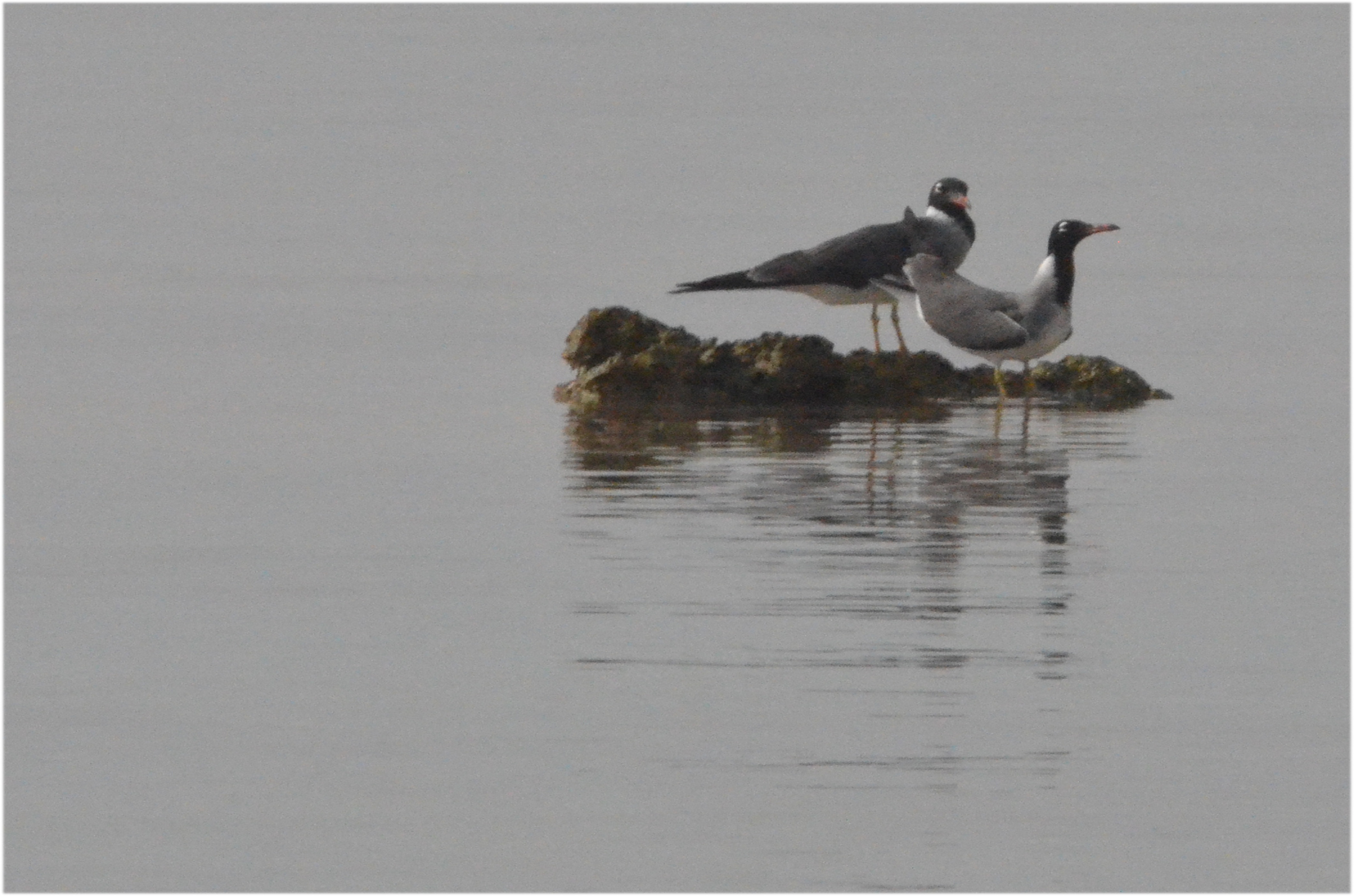 نورس أبيض العين قرب محمية نبق